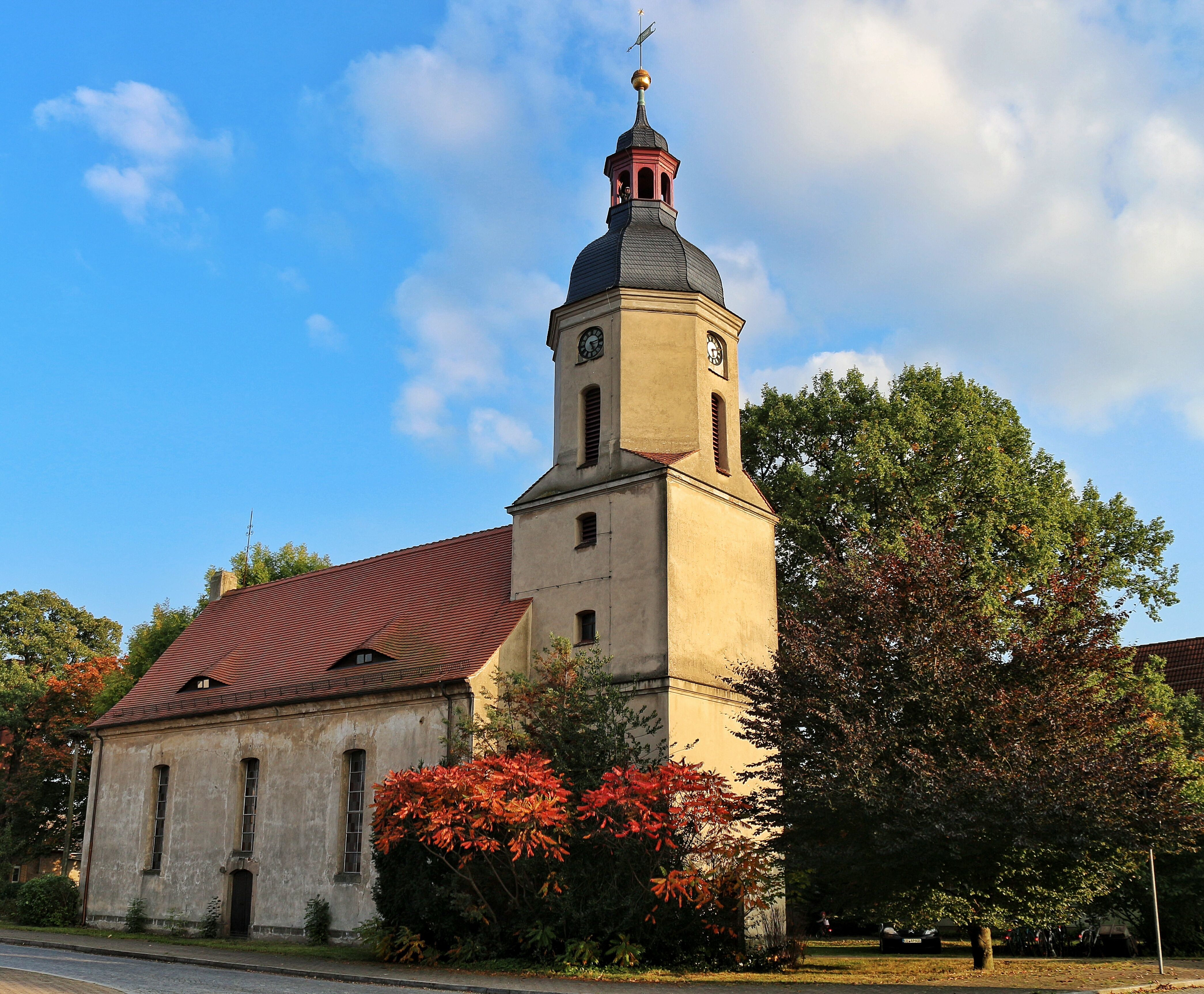 Denkmalgeschützte Dorfkirche in Plessa, Landkreis Elbe-Elster, Land Brandenburg